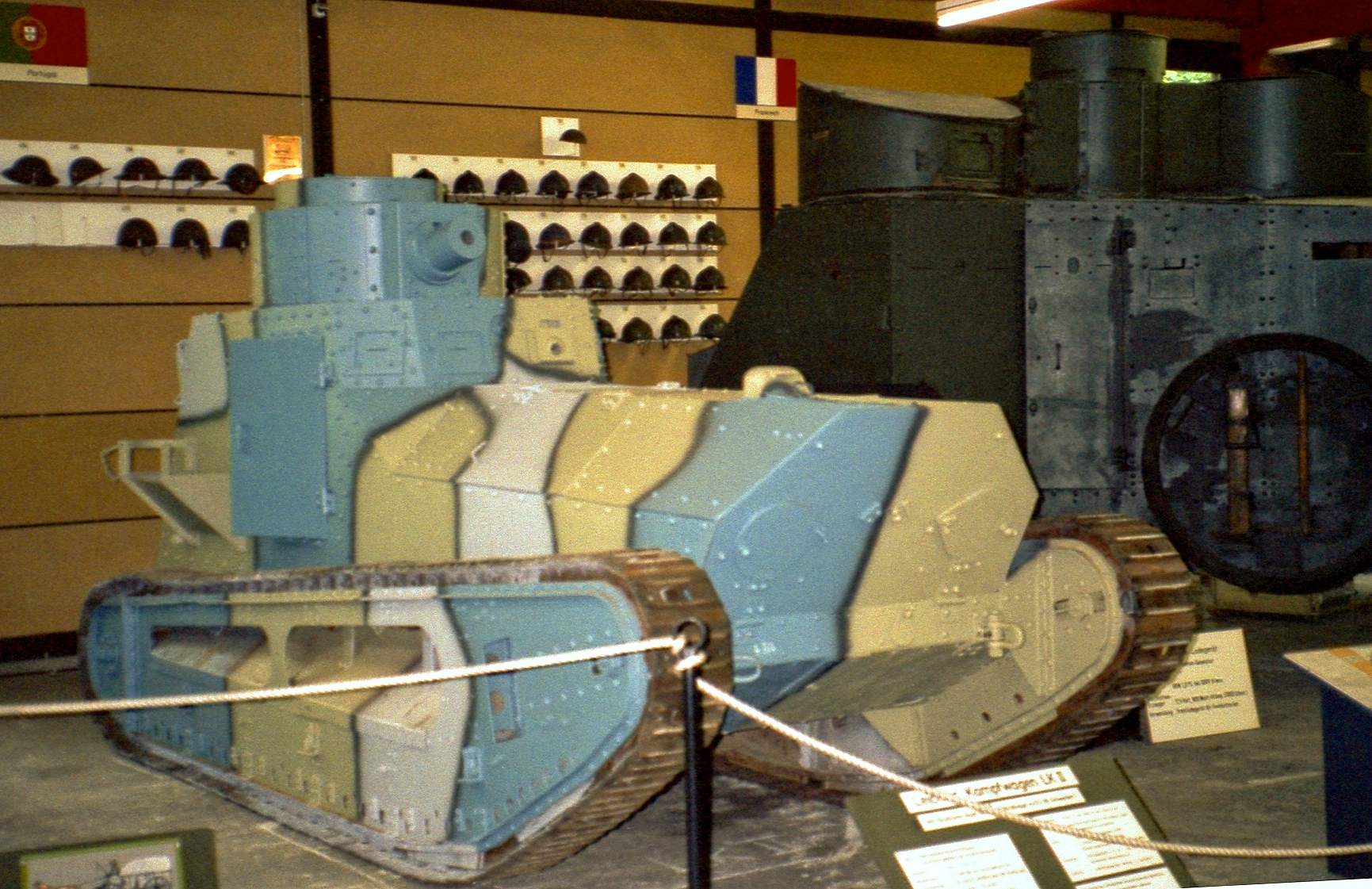 Leichter Panzer LK II im Panzermuseum Munster am 28.05.1993